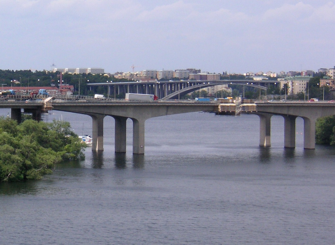 Olycksplatsen i july 2006, Essingebron, Stockholm